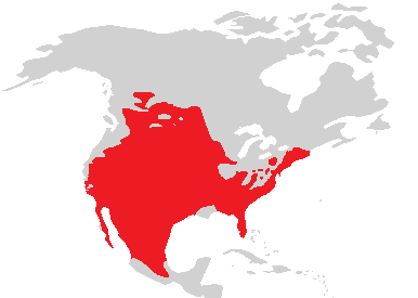 Scaphiopodidae range map